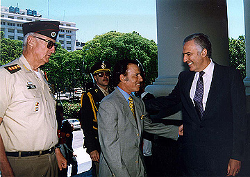 BUENOS AIRES - EL PRESIDENTE CARLOS MENEM EN LA REUNION CON PARTICIPANTES DEL CURSO DE JEFES DE UNIDADES DEL EJERCITO.